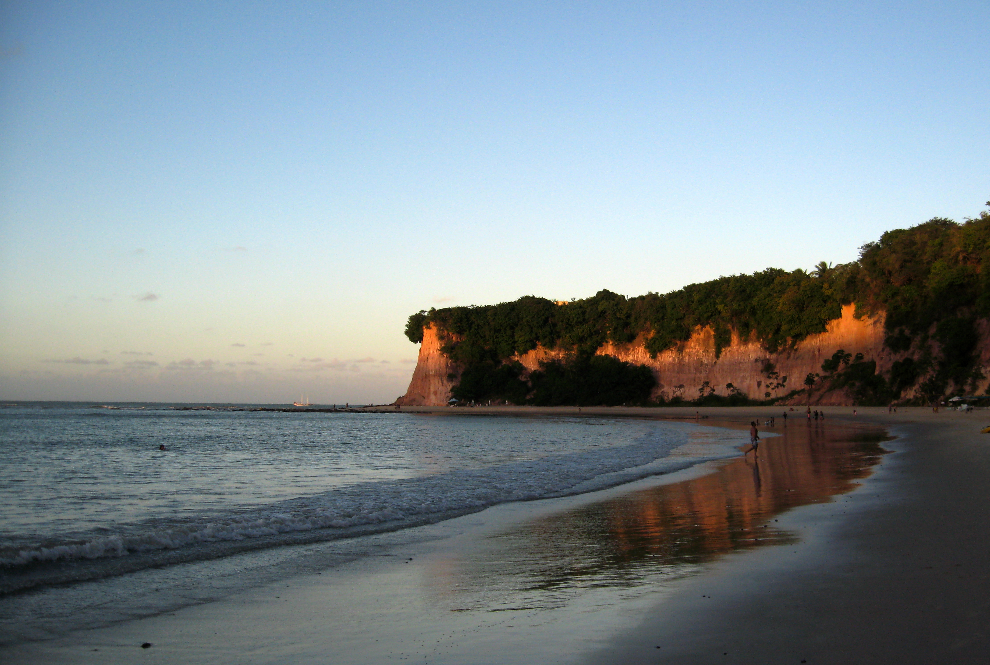 Entardecer Praia dos Golfinhos com suas magníficas Falésias